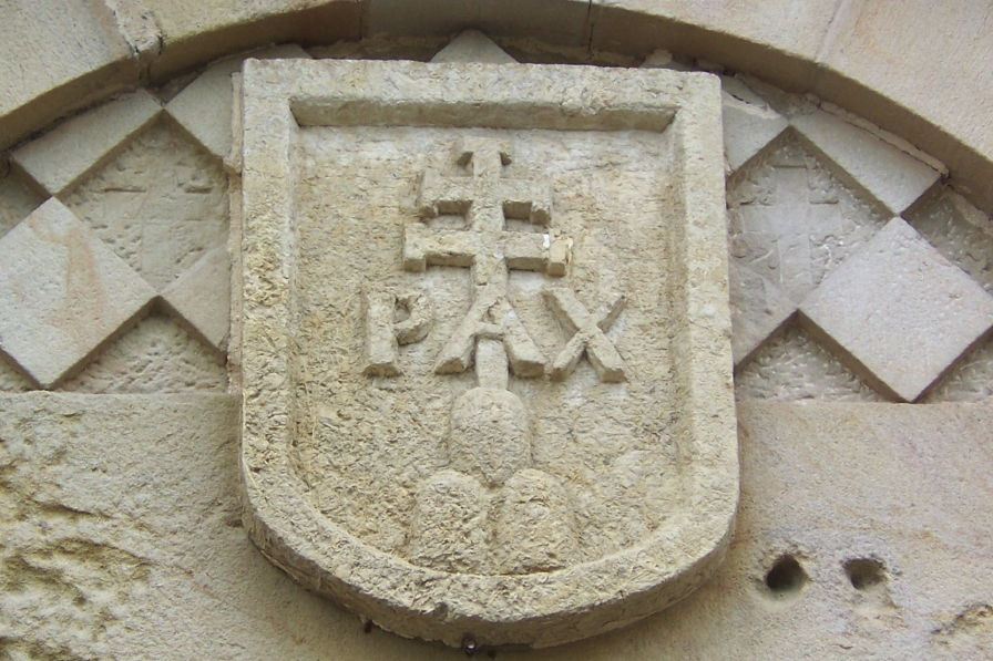 Détail du portail de l'église du Bourg dans le Lot. On y voit un blason de pierre avec l'inscription "PAX".